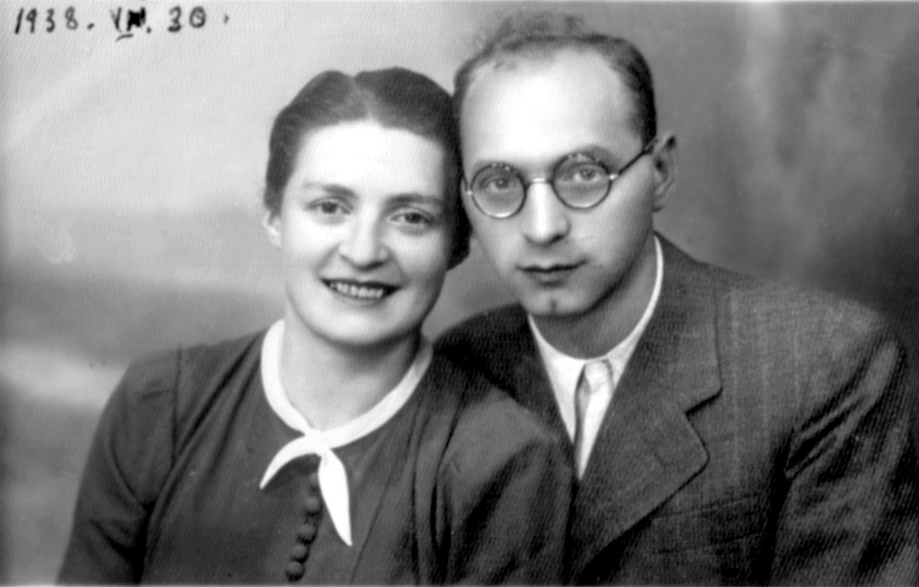 חנה ומנחם אורן, אוגוסט 1938